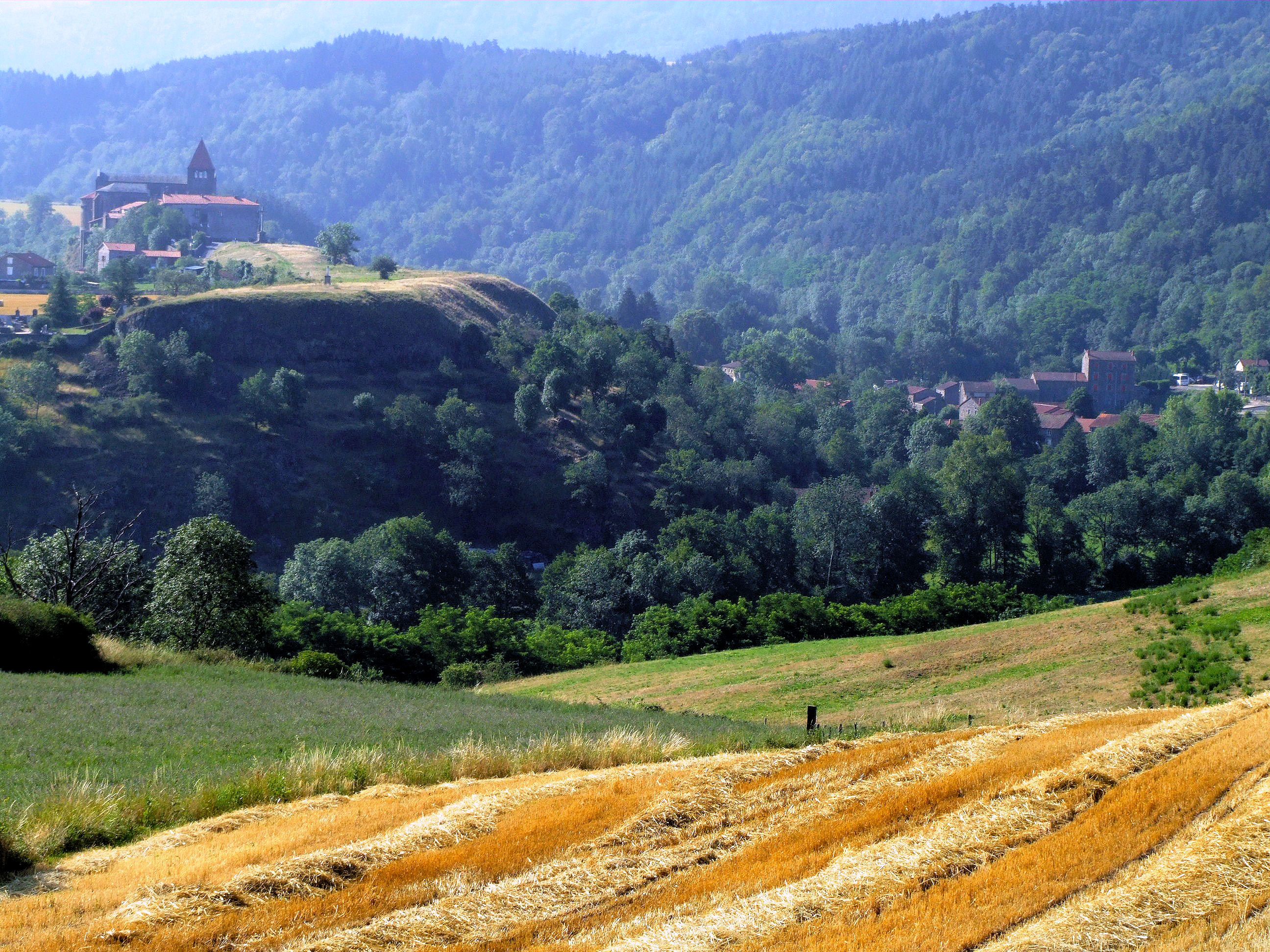 Chanteuges - Vue du site